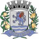 Brasão da cidade de Vitória Brasil, SP